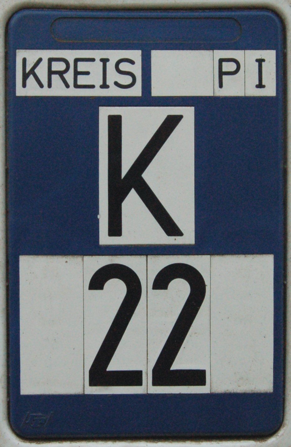 Kennzeichnung der Kreisstraße 22 (K 22) an einem Leitpfosten in Uetersen